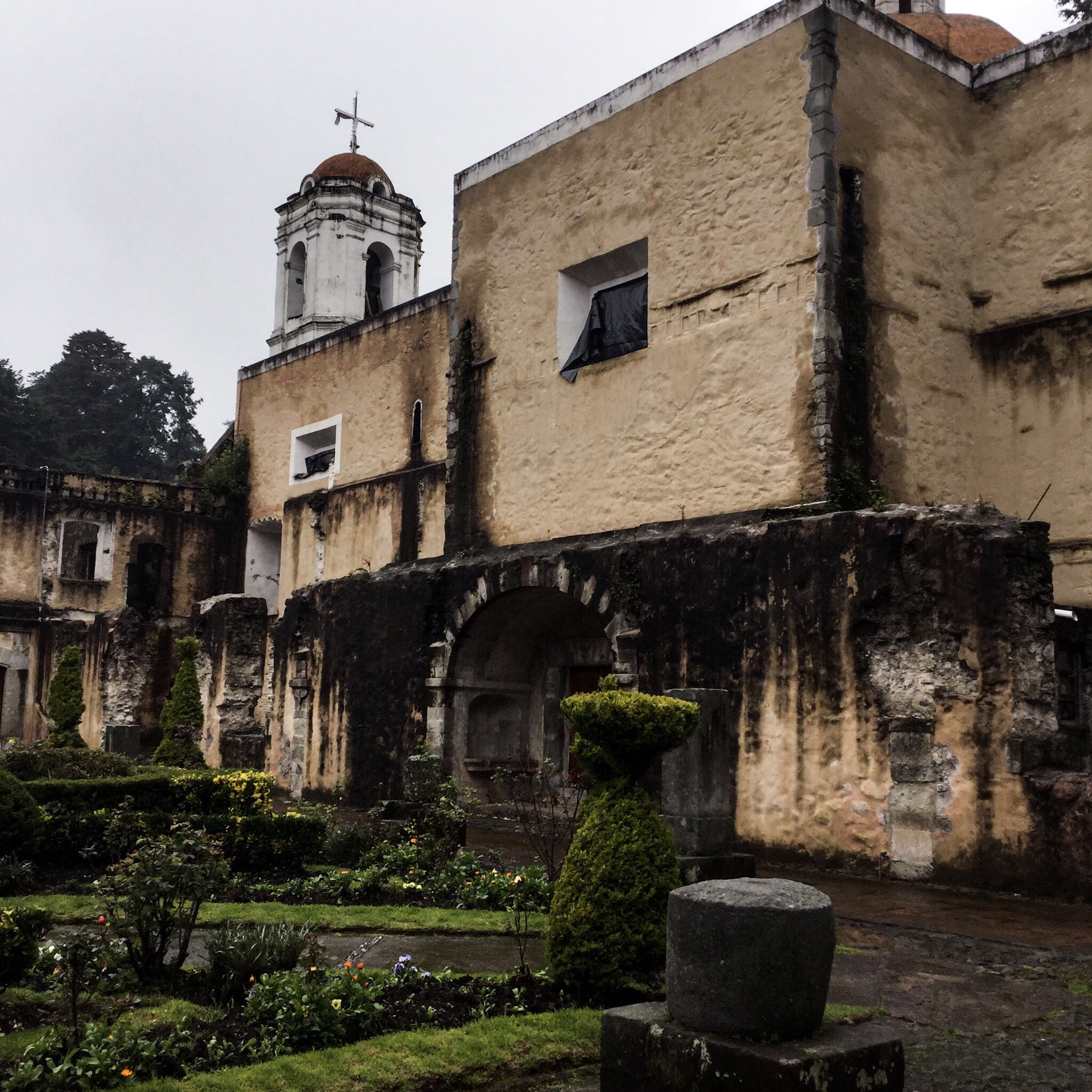 Esta es una de las diferentes vistas del campanario. La foto fue tomada desde el Claustro del Desierto de los Leones. Cuando los frailes pasaban tiempo en él, se podían escuchar las campanadas para realizar las diferentes actividades del día.